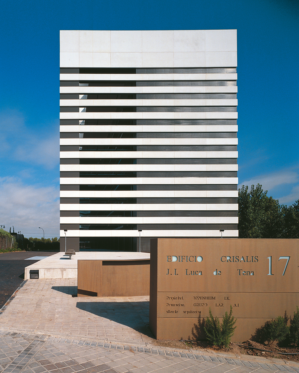 Allende Arquitectos